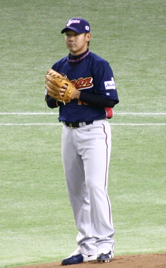 Daisuke Matsuzaka